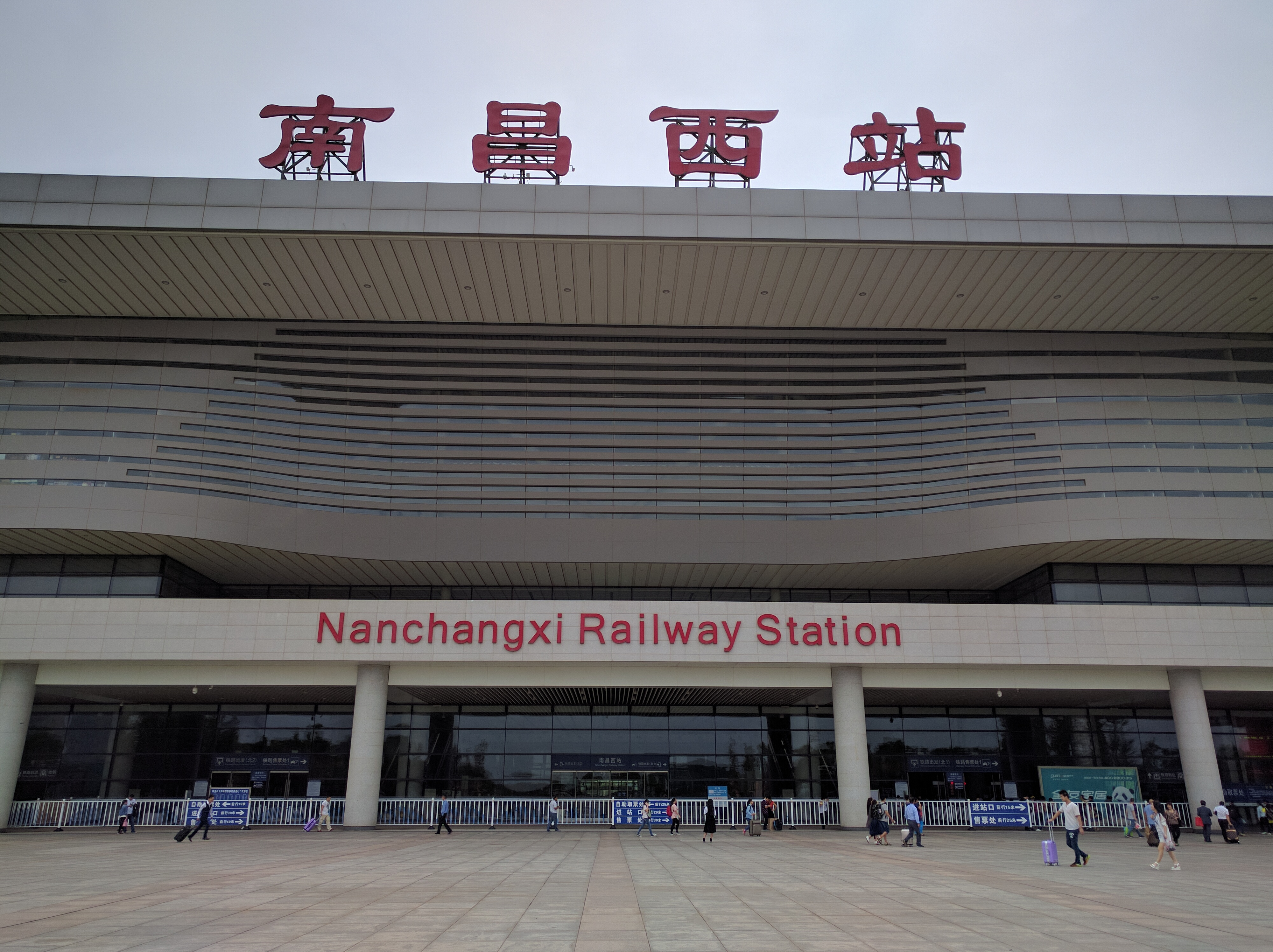 南昌西站站房北侧